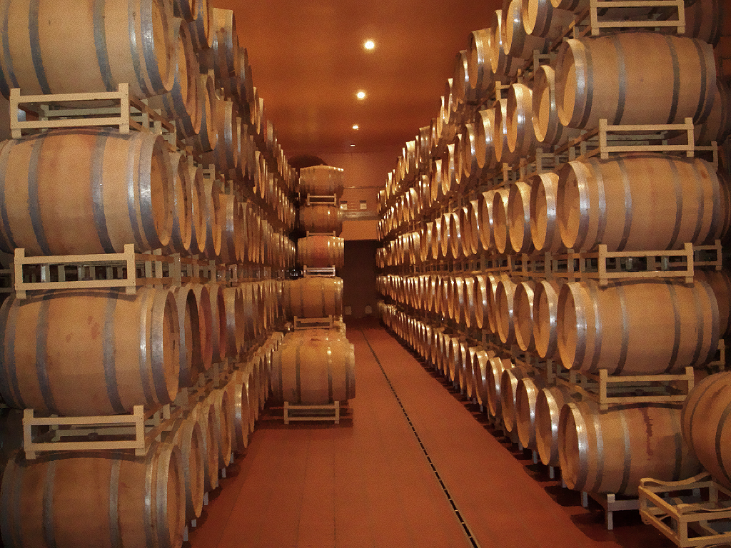 Le mitiche cantine dei marchesi Antinori, nobile famiglia imparentata con i Conti della Gherardesca citati da Dante nell'Inferno. Lo scatto è stato effettuato a Guado al Tasso, nelle cantine di famiglia dove riposano alcuni tra i Cabernet e i Merlot tra i più buoni d'Italia...